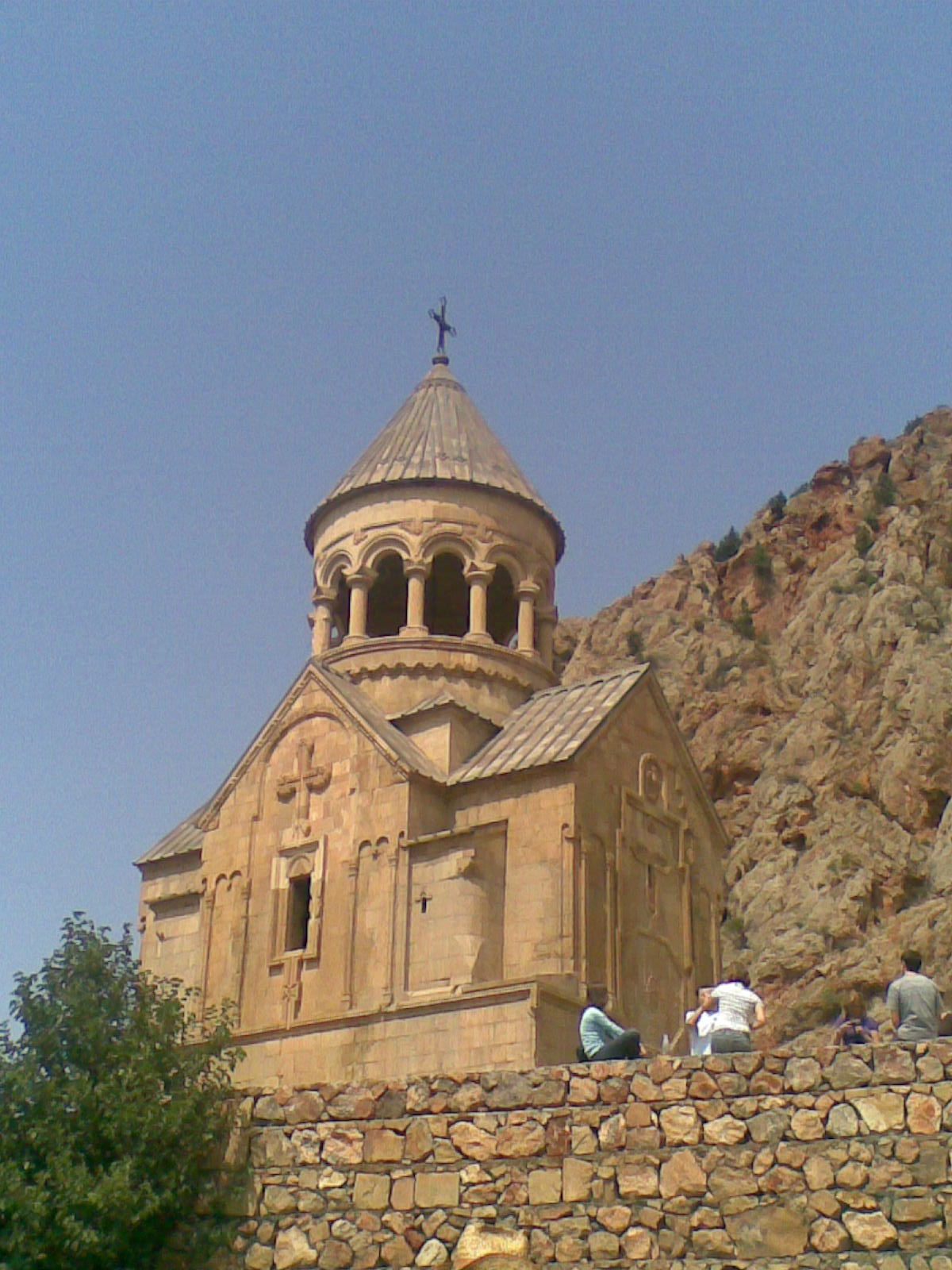 Noravank, Armenia. 8.1/1.1